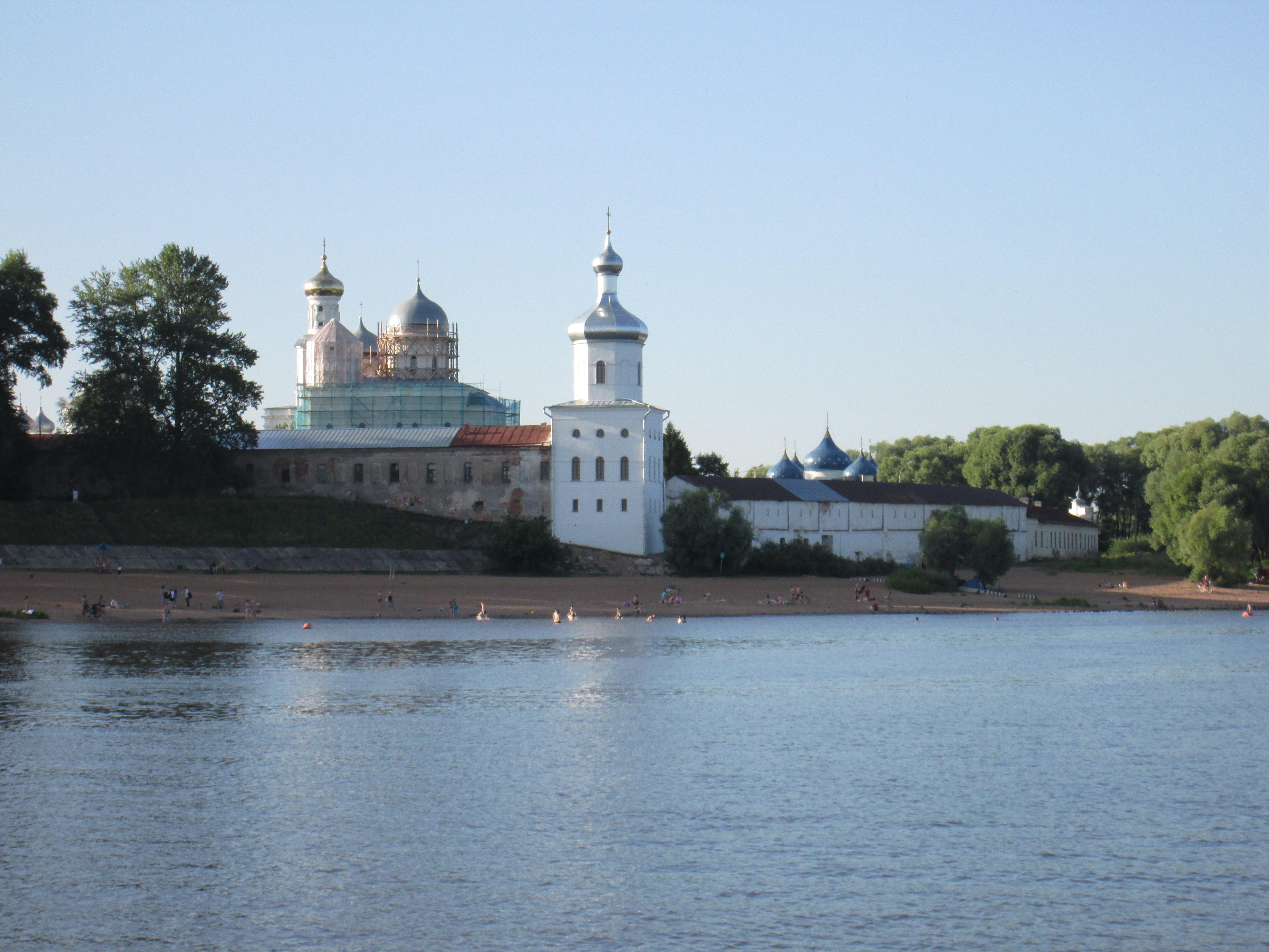 Юрьев монастырь с Волхова